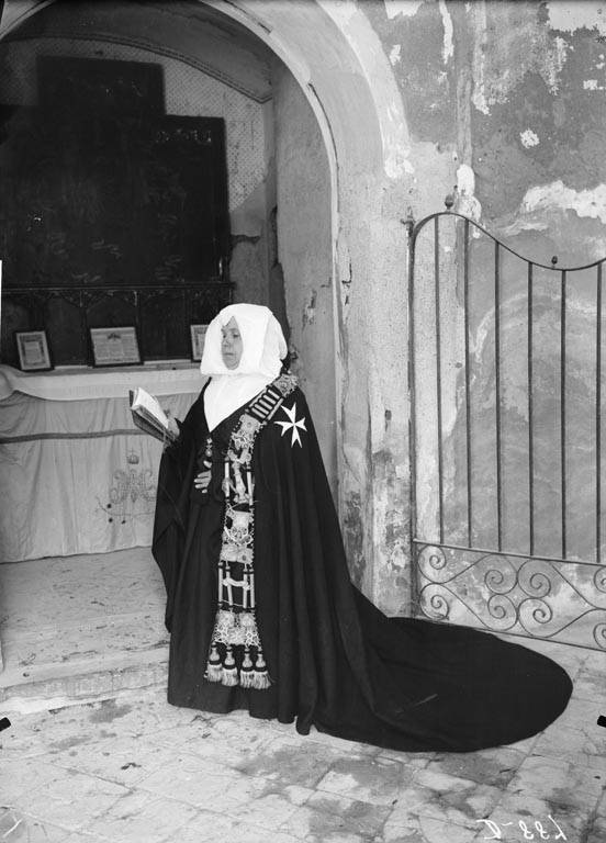 Imatge